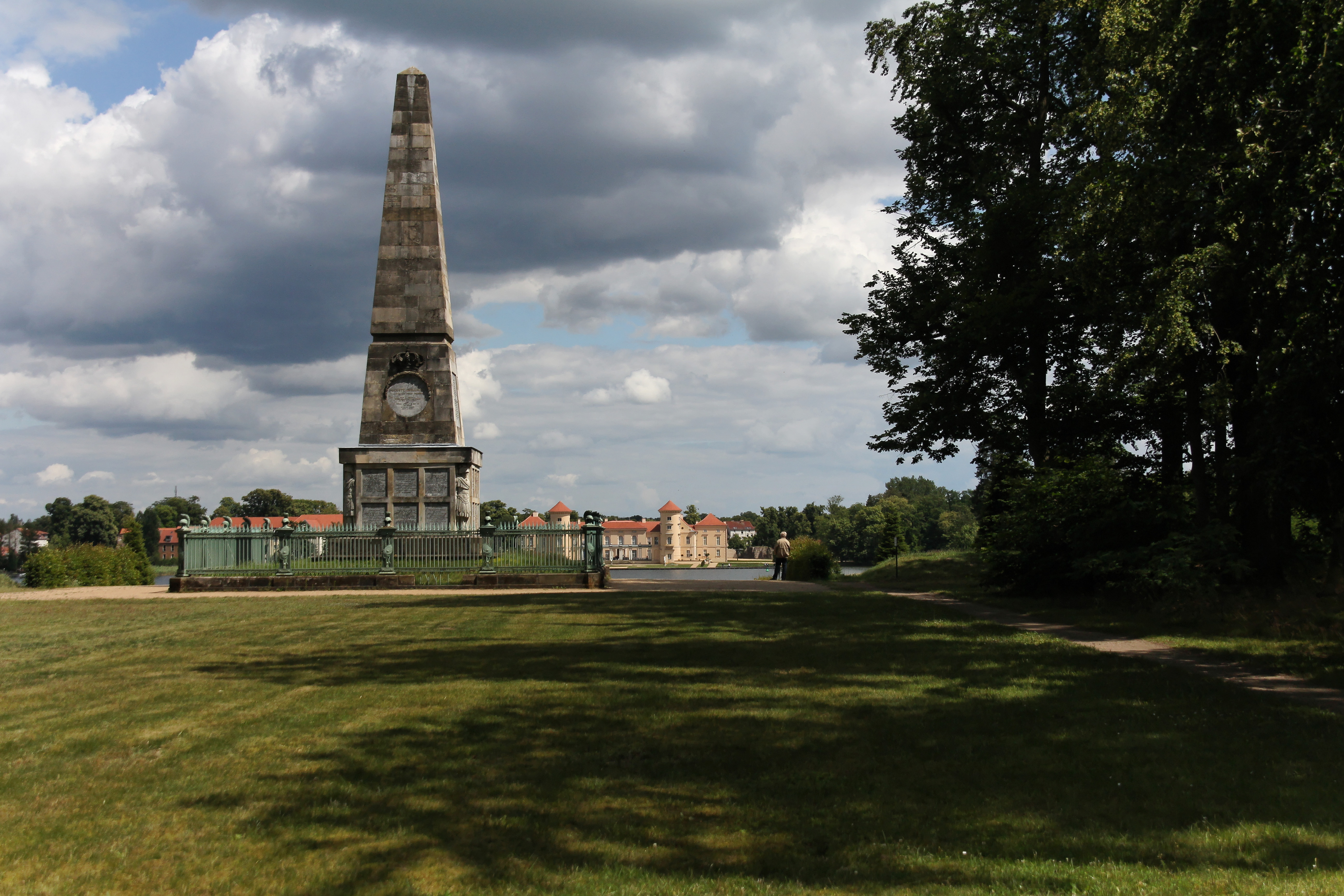 Blick auf Schloss Rheinsberg mit Obelisk